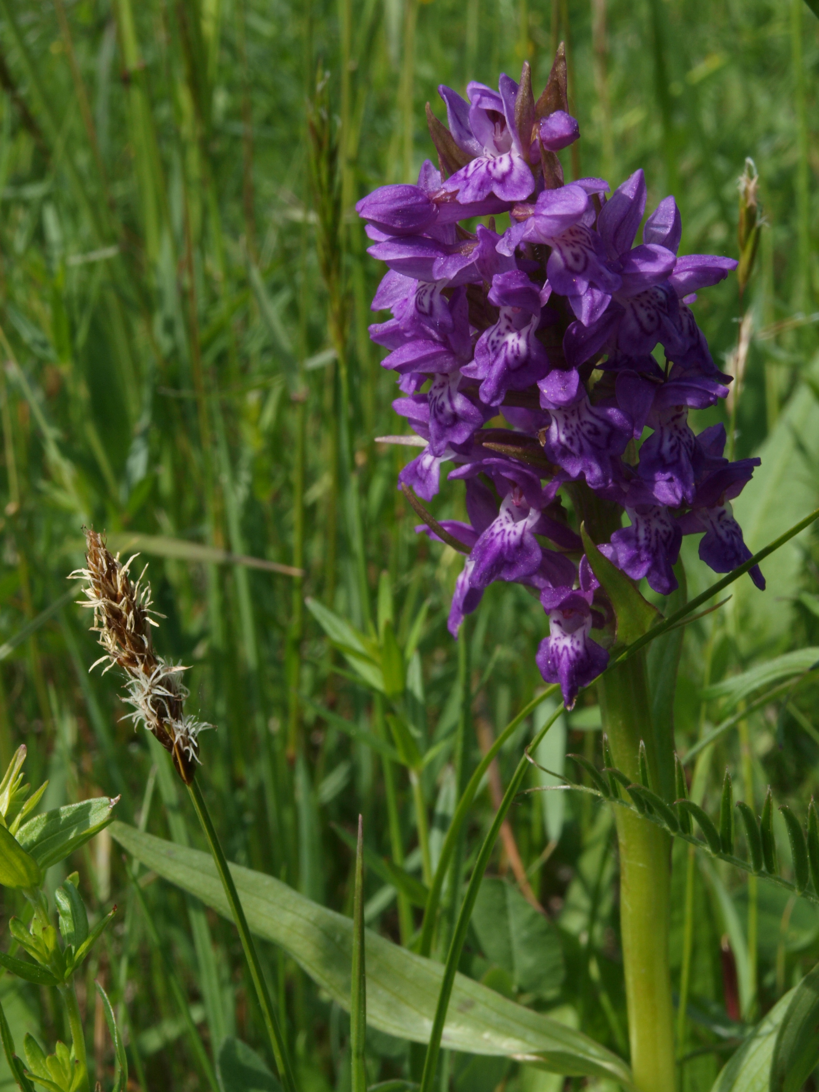 Prstnatec májový (Dactylorhiza majalis).